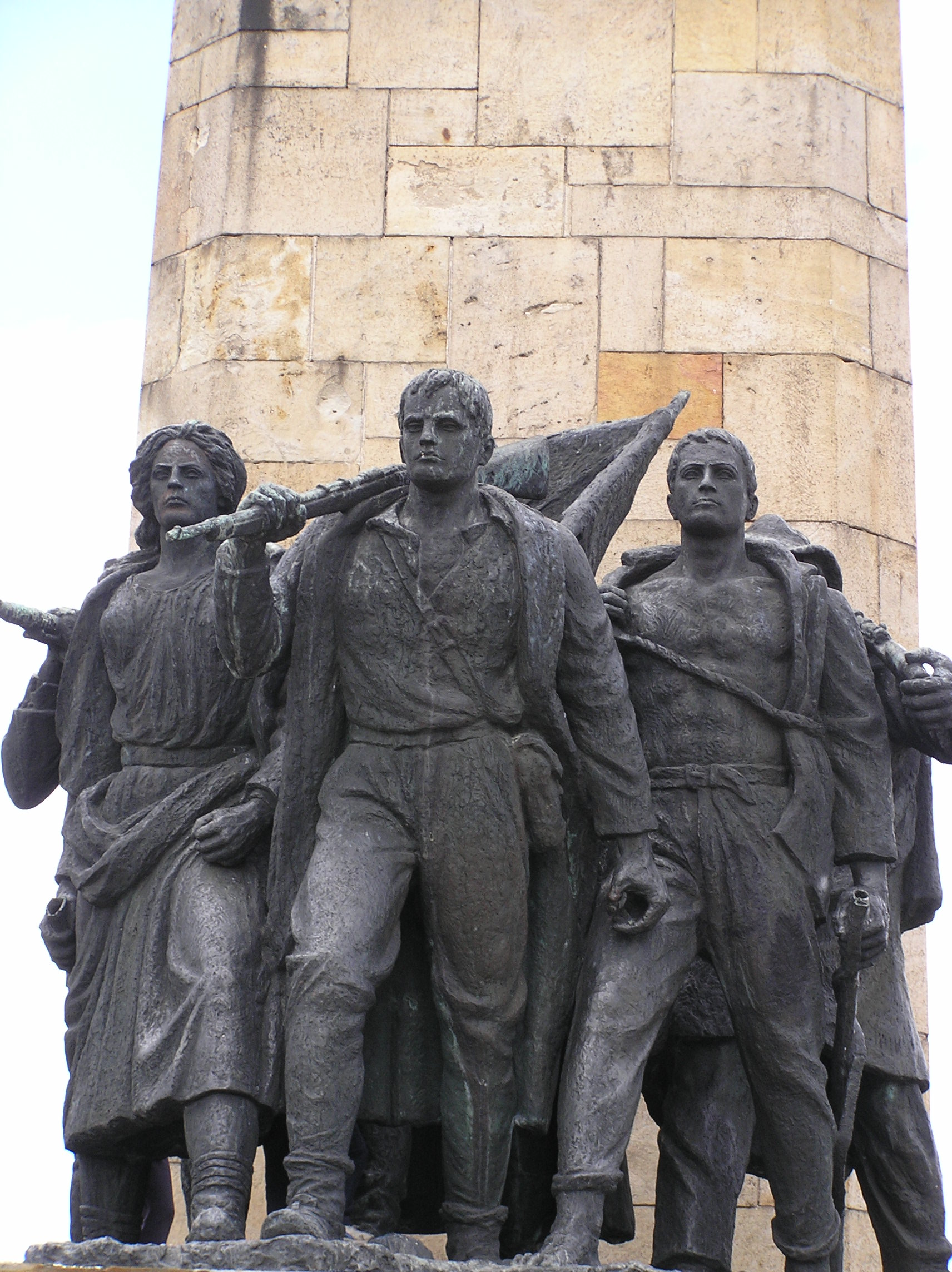 Ово је фотографија заштићеног природног добра у Србији под шифром: НП01 This is a a photo of a natural area in Serbia with ID: НП01 Fruška gora - spomenik na Iriškom vencu.